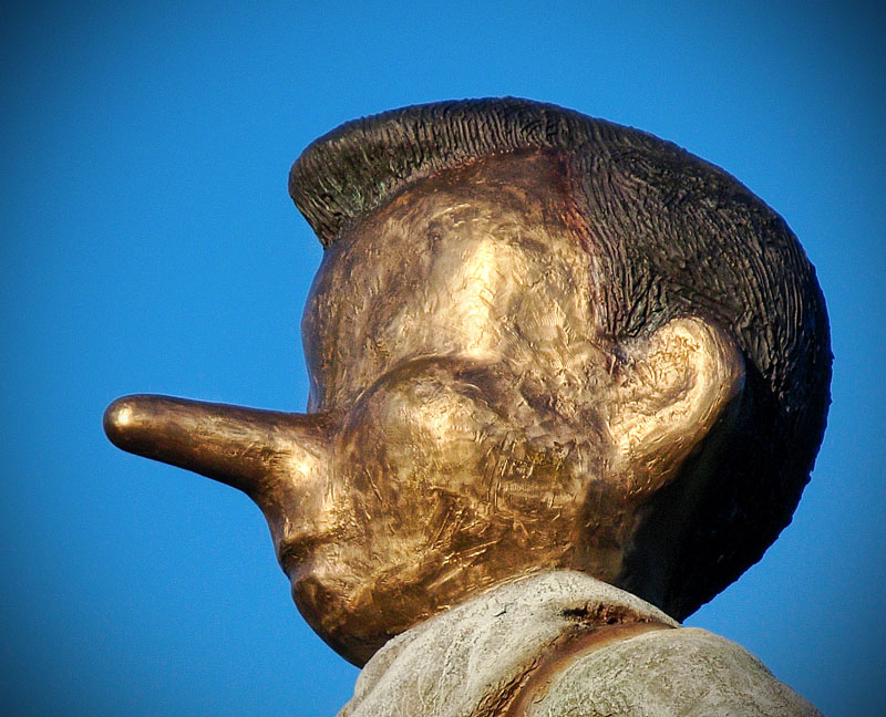 Pinocchio-skulpturen i Borås, av Jim Dine.